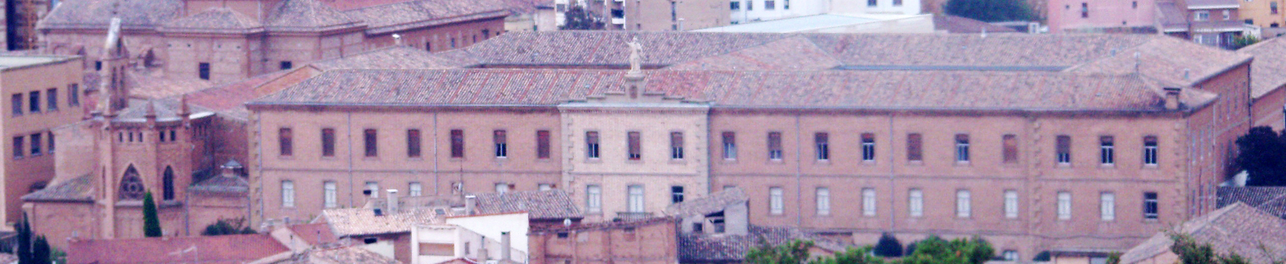 Iglesia y Colegio de San Francisco Javier (Tudela), en 2010 (desde Corazón de Jesús)